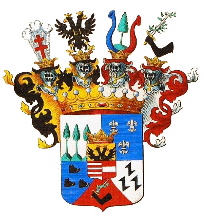 Wappen der Grafen von Fürstenbusch, original altkolorierter Wappen-Kupferstich